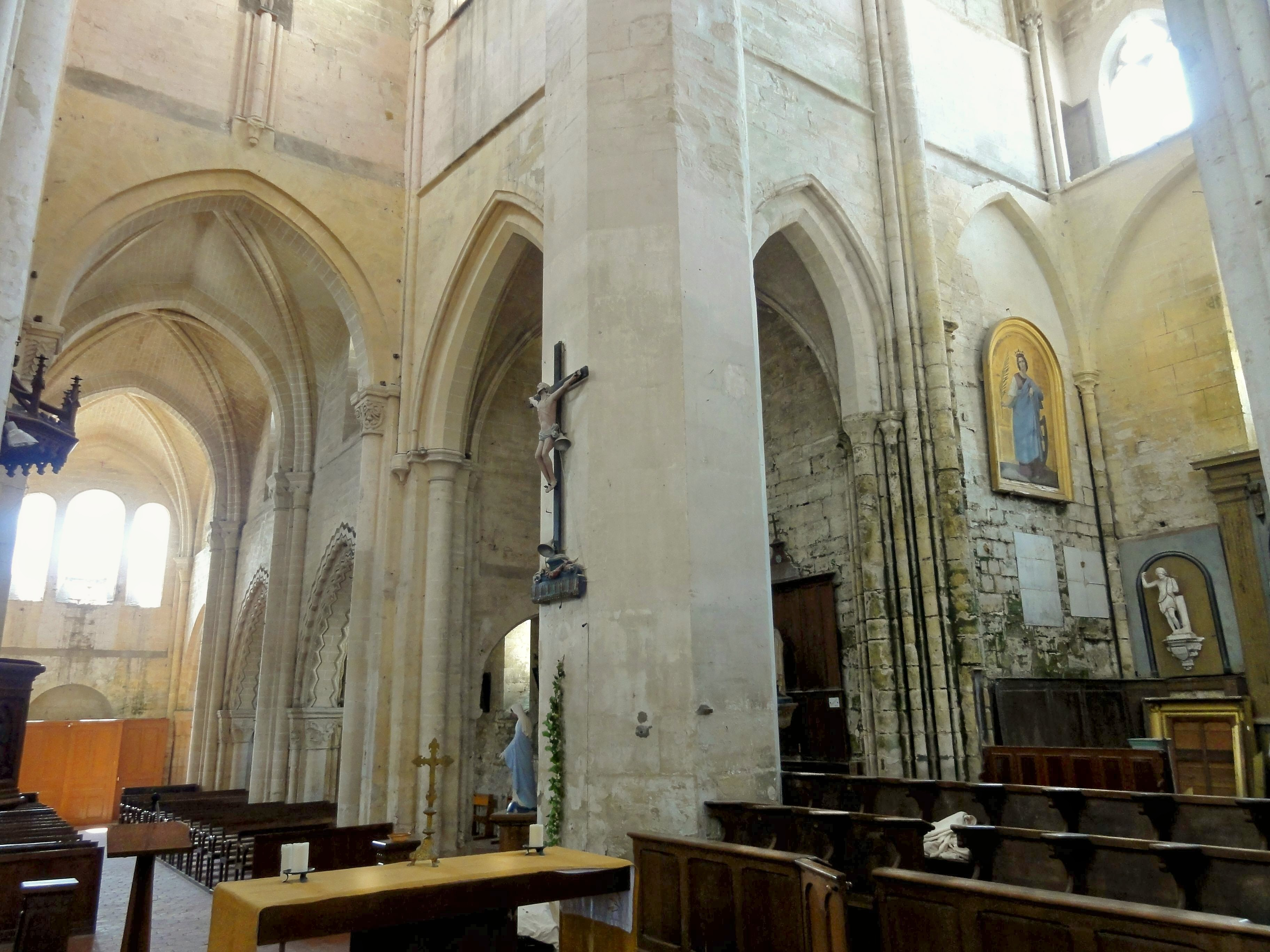 Croisée du transept, vue vers le nord-ouest.